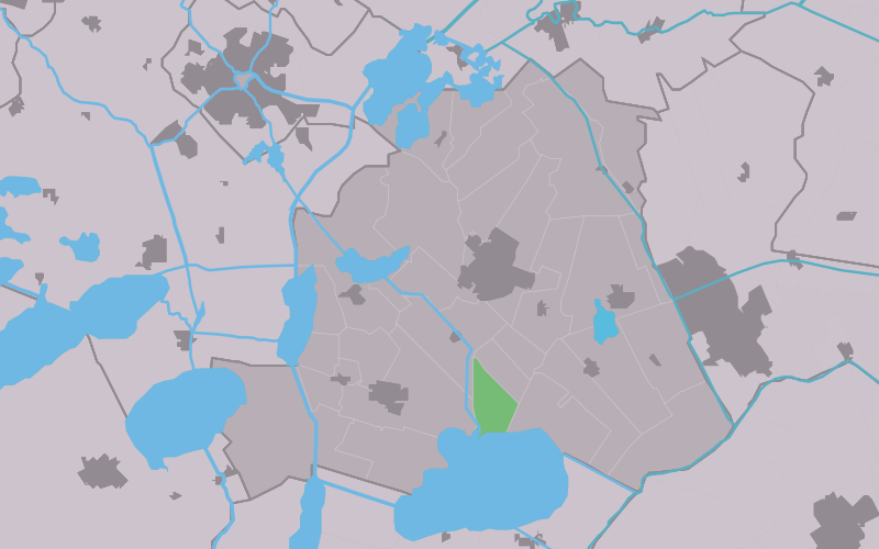 Kaartsje fan himrik fan Alde_Ouwer